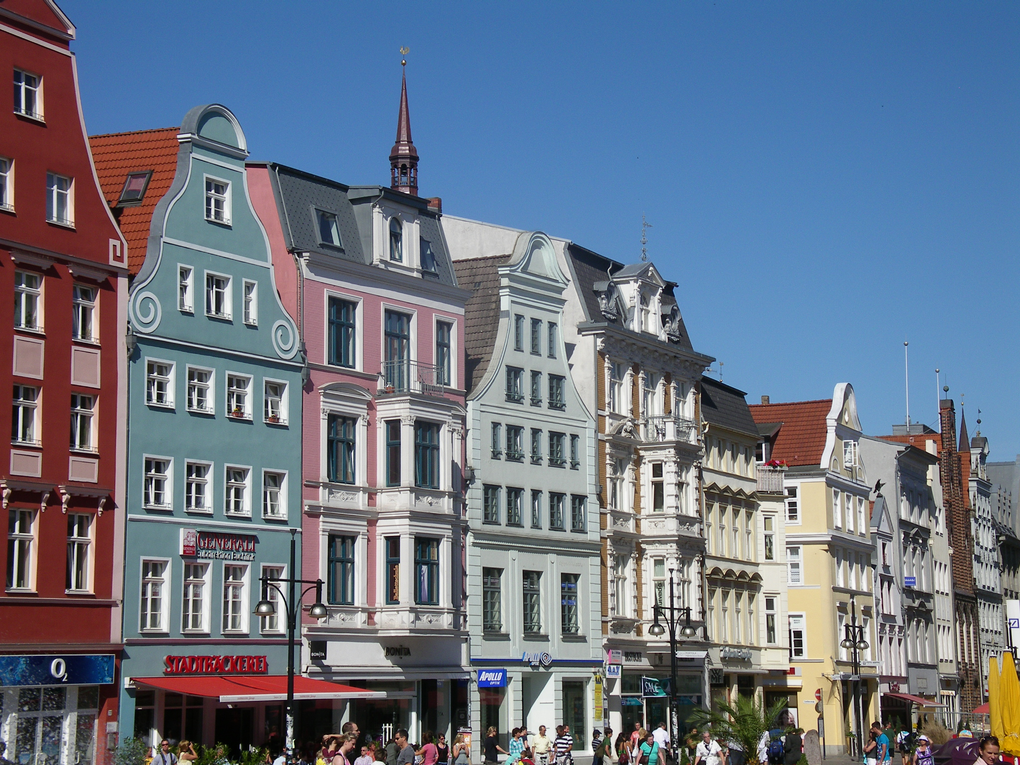 Rostock, Kröpeliner Straße